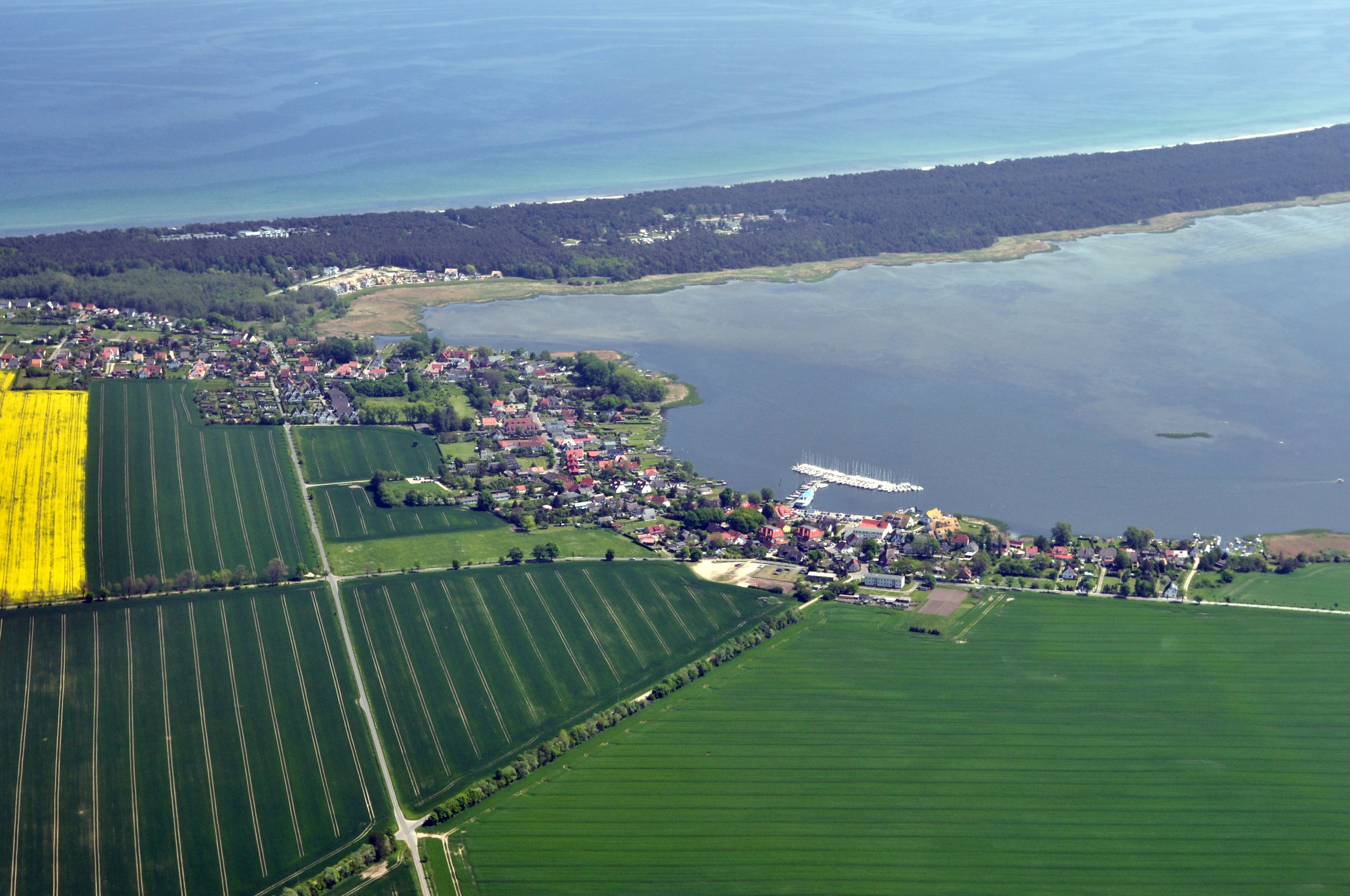 Die Bilder wurden von mir während eines einstündigen Rundflugs ab Flugplatz Güttin am 21. Mai 2011 aufgenommen. Die Bildbeschreibung steht im Dateinamen. Aufgenommen mit einer Nikon D5000 durch das Seitenfenster des Flugzeugs.